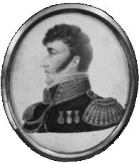 Antonio Gonzalez Balcarce